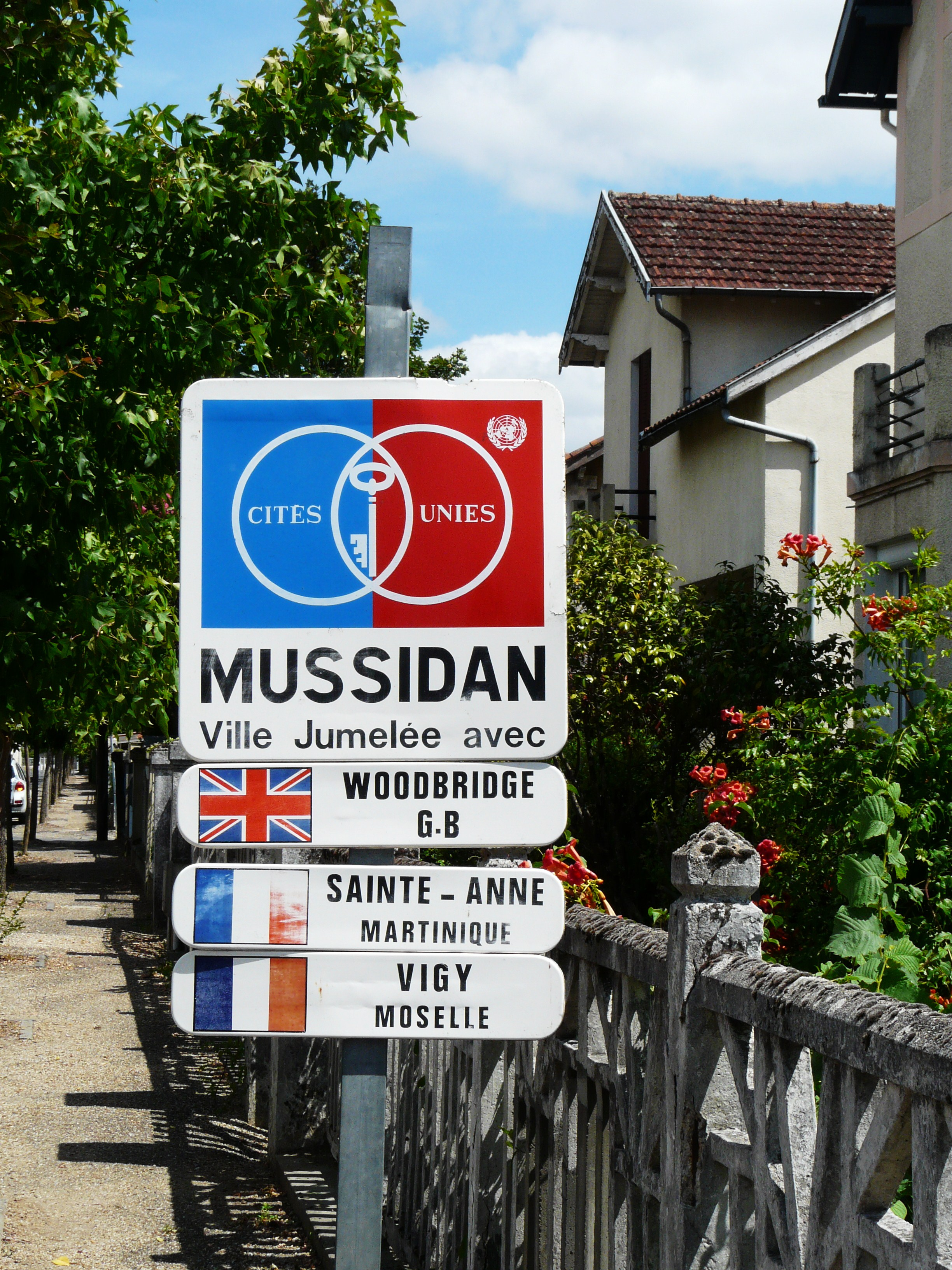 Panneau de jumelages de Mussidan, Dordogne, France.